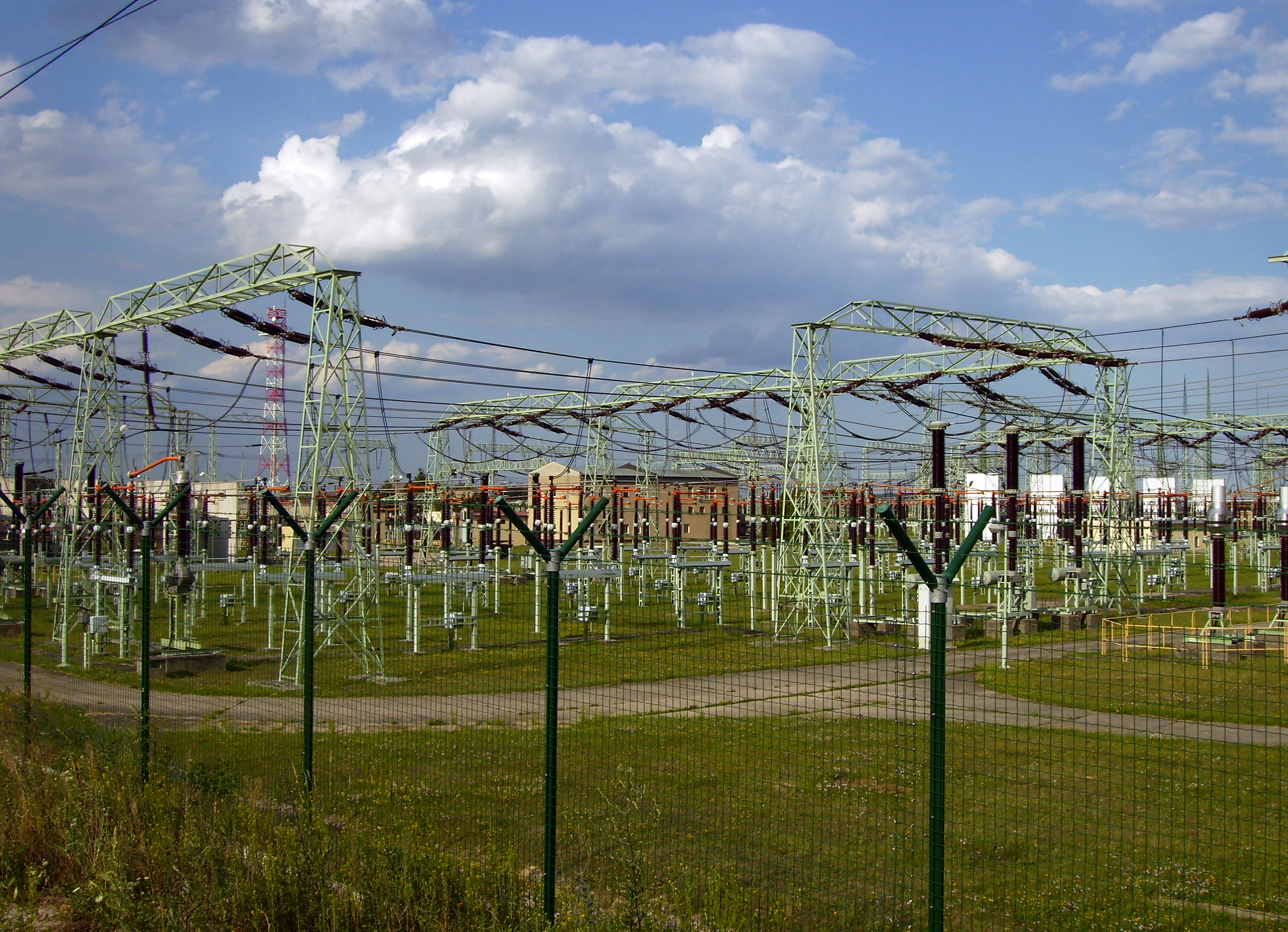 Trafostanice Čechy-střed u Mochova.